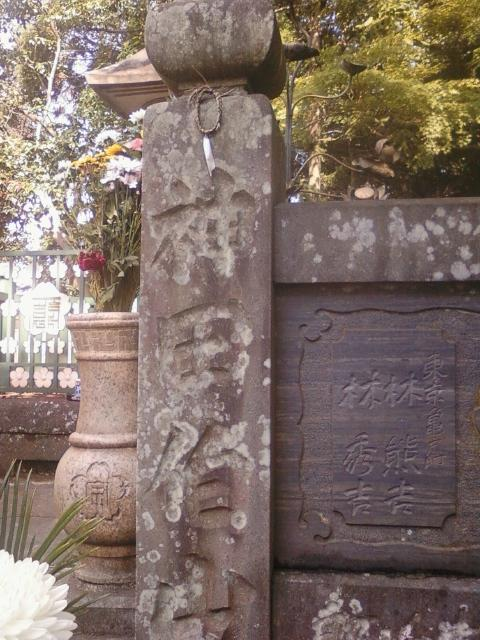 3代目神田伯山の寄進による石。宗吾霊堂(宗吾親子の墓, 東勝寺 (成田市))にて。